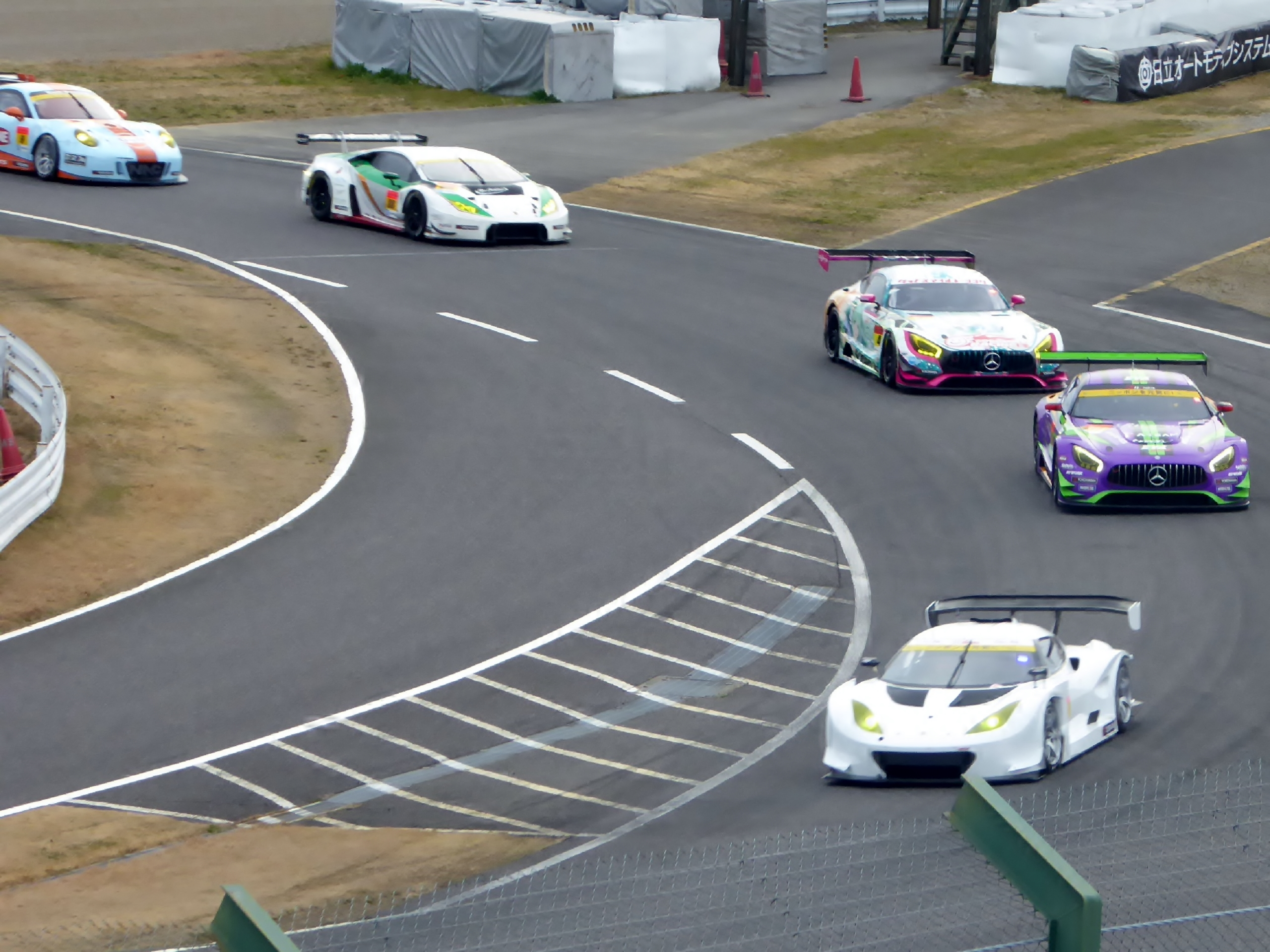 鈴鹿ファン感謝祭2017における一幕を撮影。